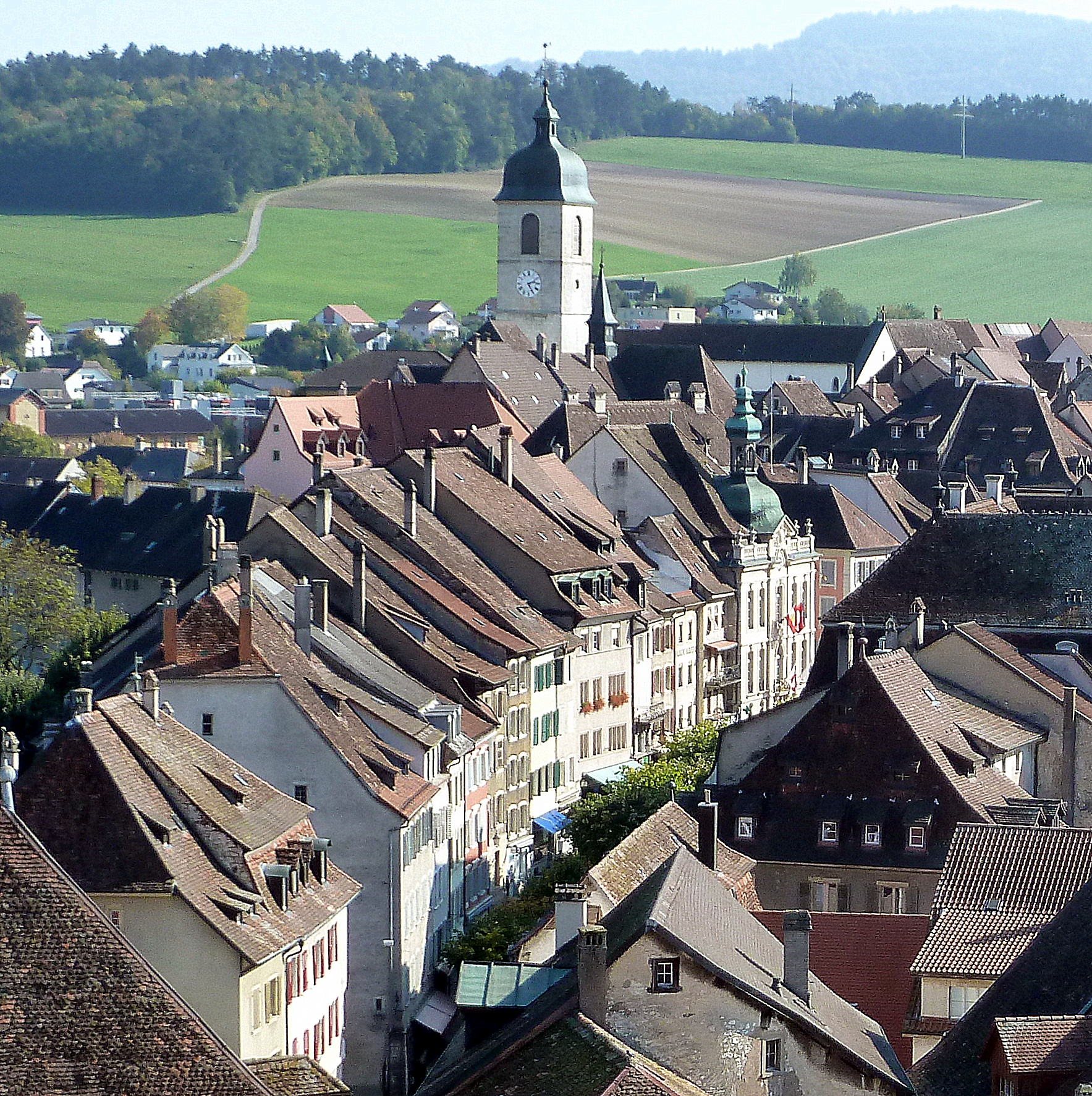 Porrentruy